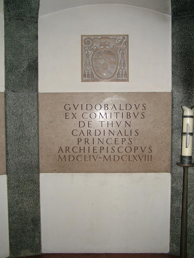 Grab Erzbischof Guidobald Thun in Salzburg